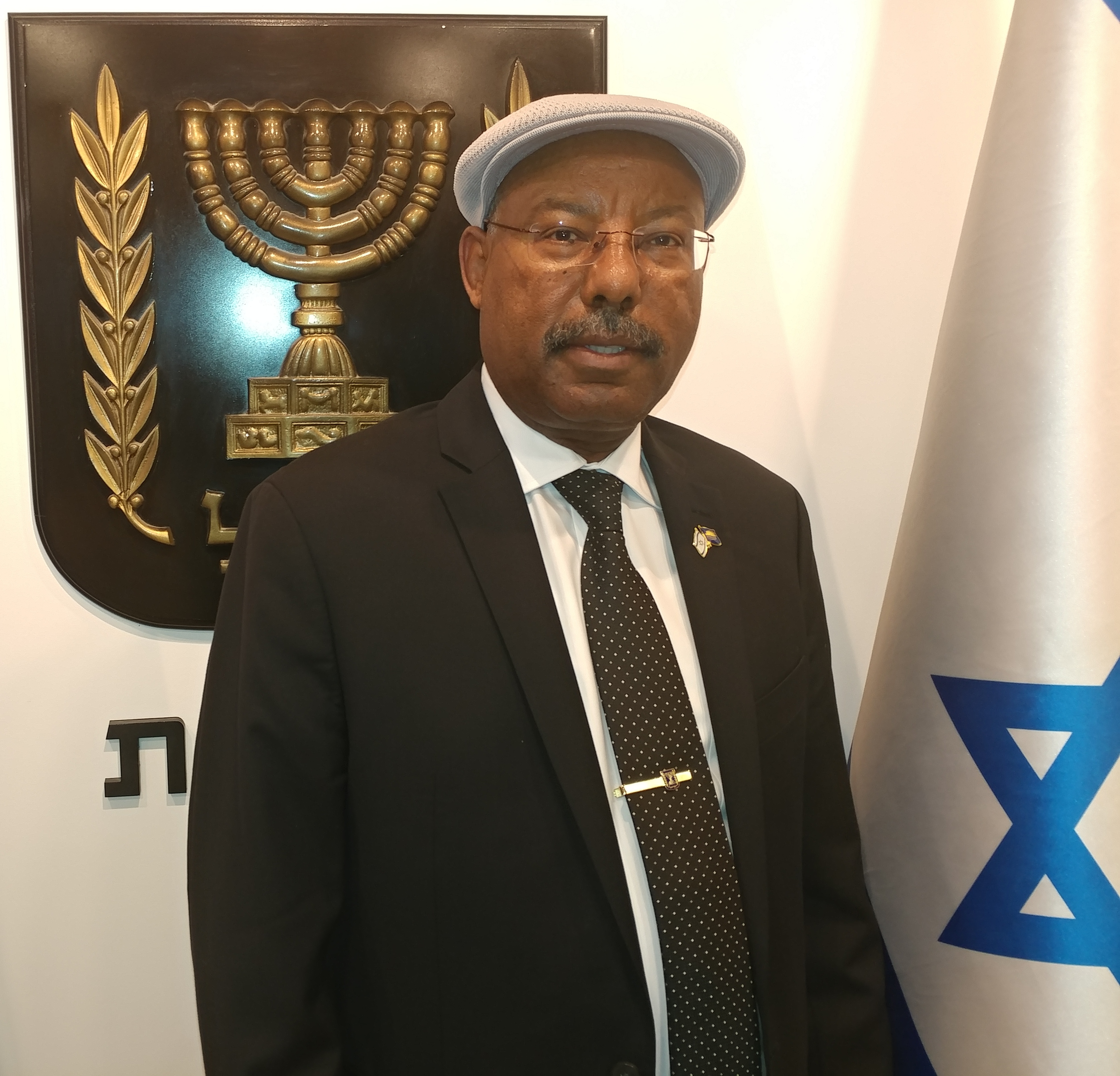 ח"כ אברהם נגוסה